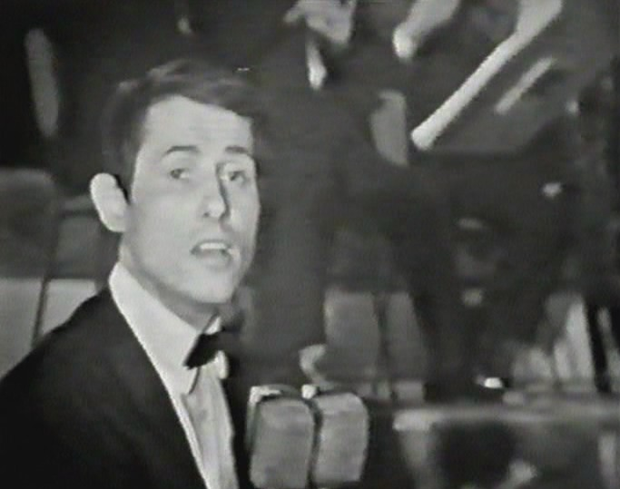 Eurovision Song Contest 1965 Regia di ROMOLO SIENA Allestimento scenografico di FRANCESCO DE MARTINO Luci di GUIDO CARACCIOLO Assistente alla regia ELENA AMICUCCI Assistente di studio MARCELLO SABETTI Capo stuadra tecnica ANGELO FONTANA Prima controllo camere GUSTAVO GALLARATO Capo tecnico audio CIRO PALLONETTO Cameramen ADOLFO BOTTA, SERGIO FREISSENET, ENRICO LANDINI, FLORIDO VARZI ________________________________ Udo Jürgens